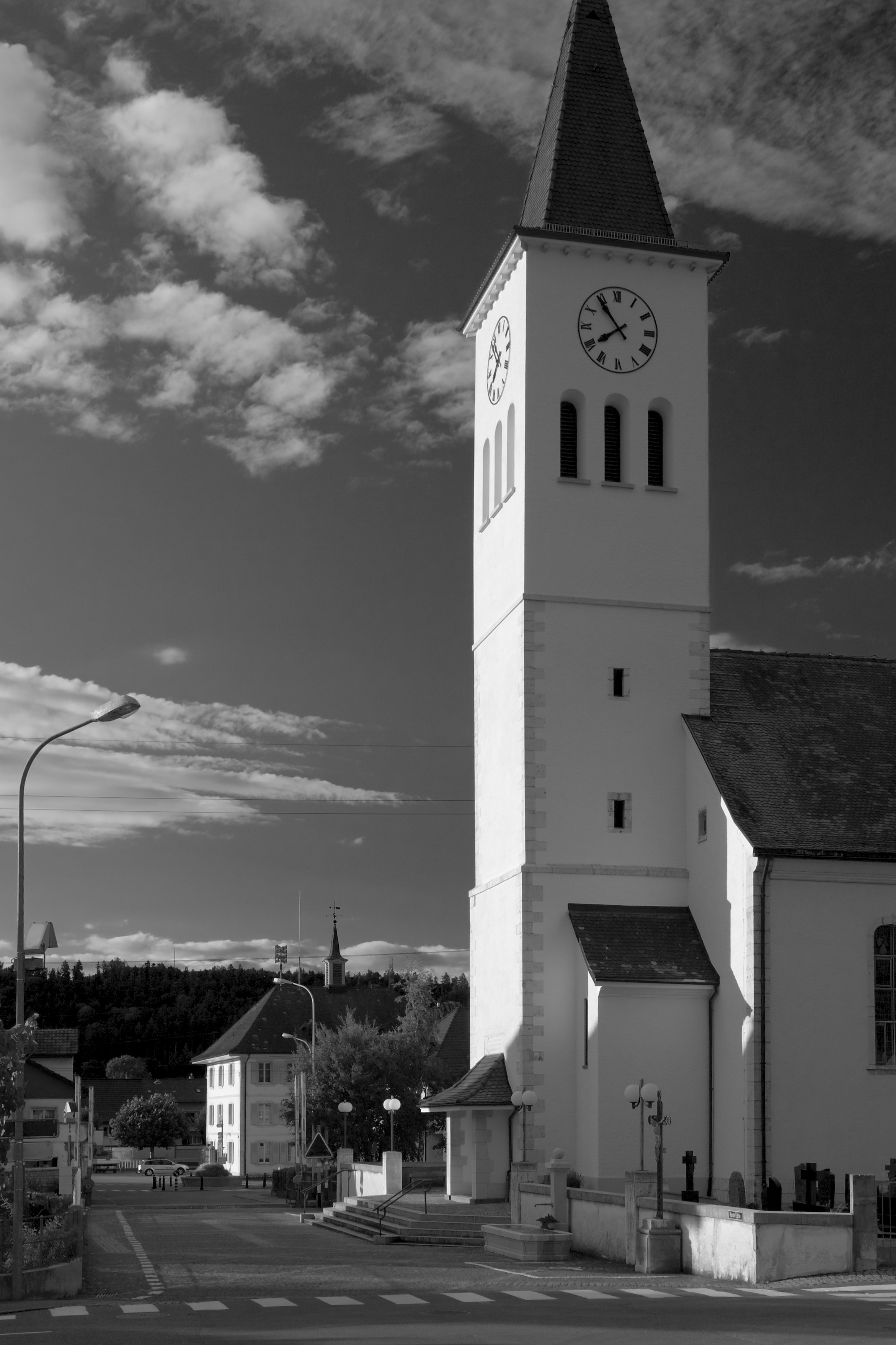 Die Kirche in Bassecourt bei Sonnenuntergang, im Hintergrund das Schulhaus